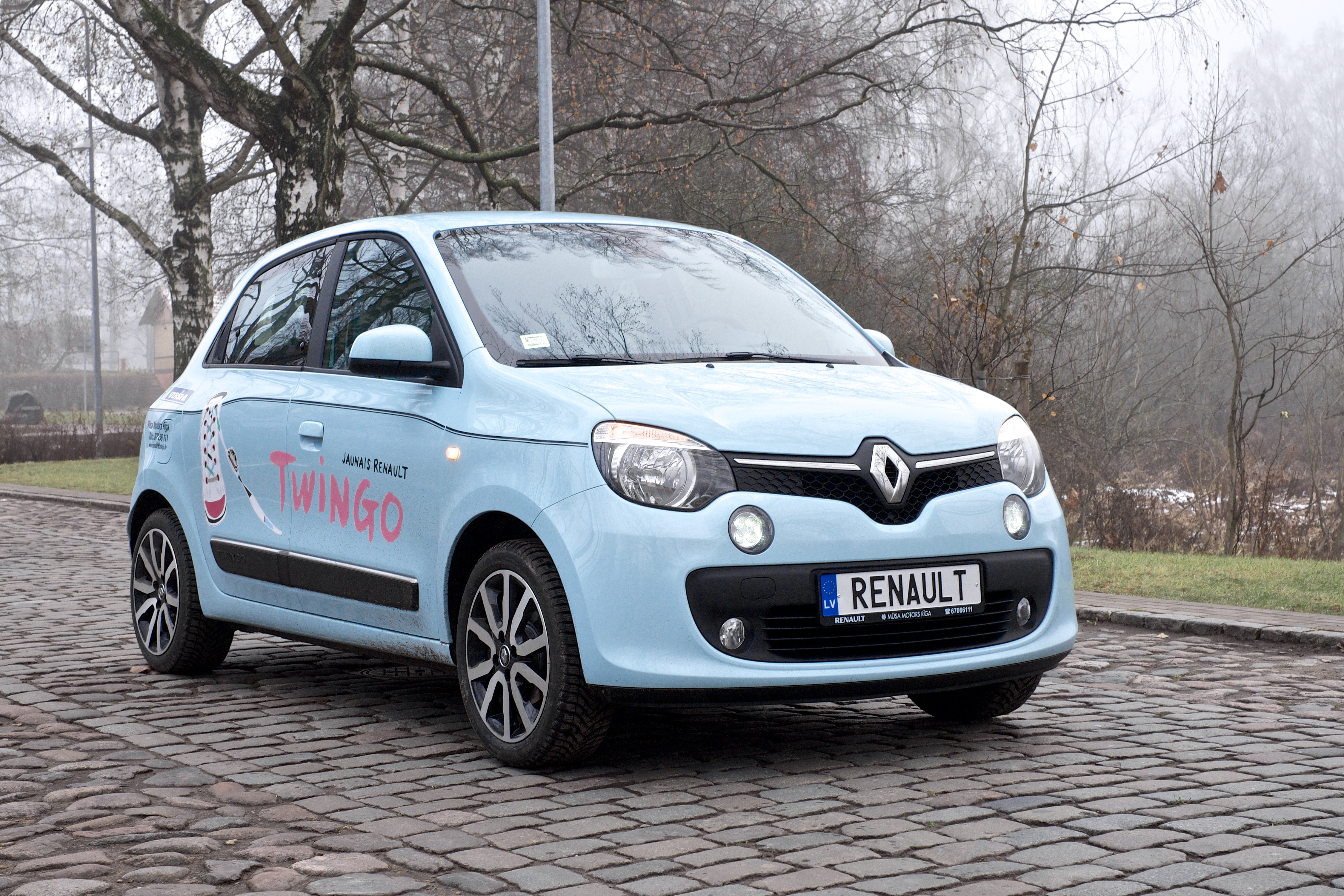 Renault Twingo 2014